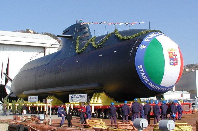 Varo del Sommergibile "Salvatore Todaro"